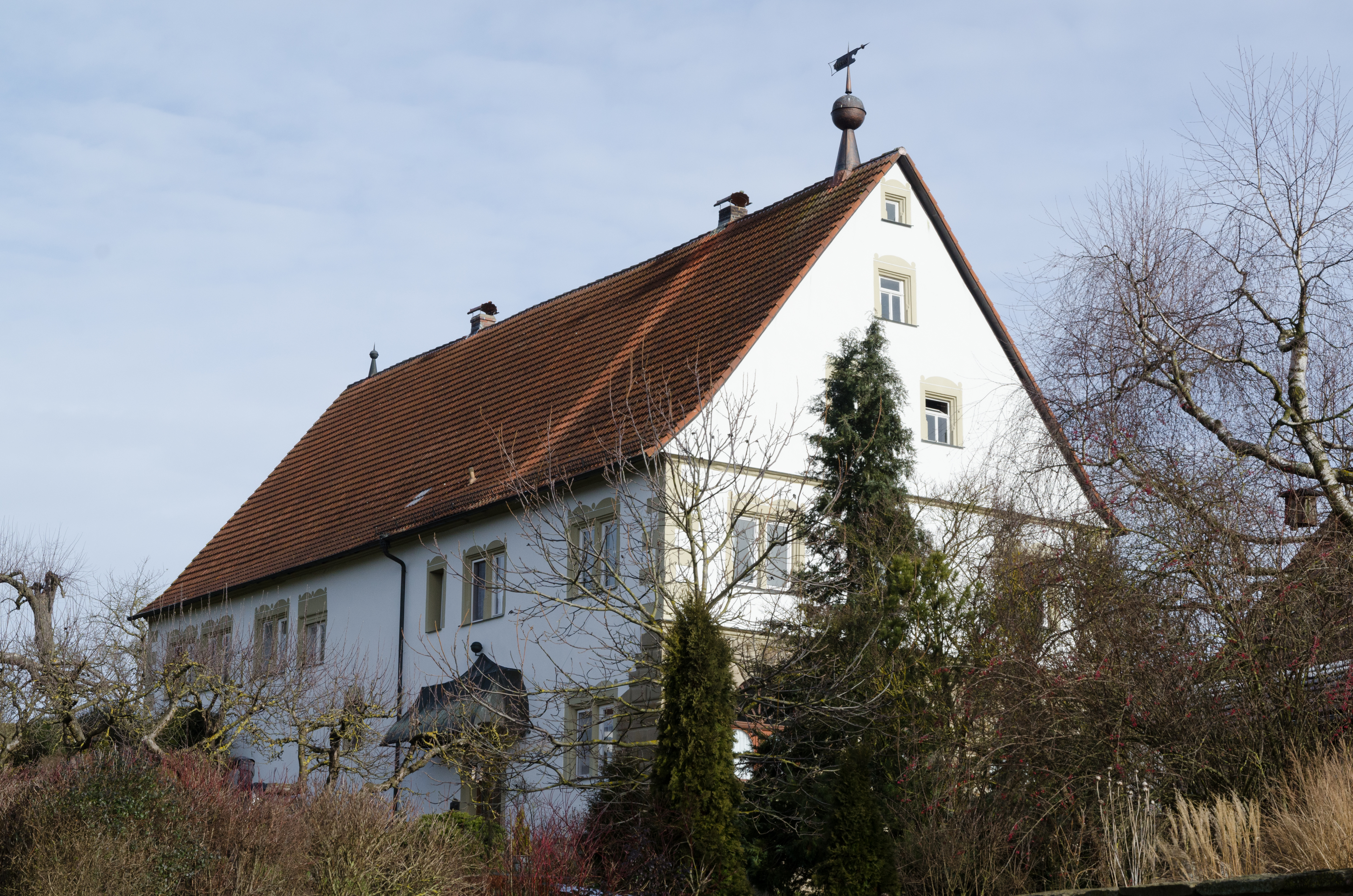 Sulzdorf an der Lederhecke, Obereßfeld, Schloßweg 2